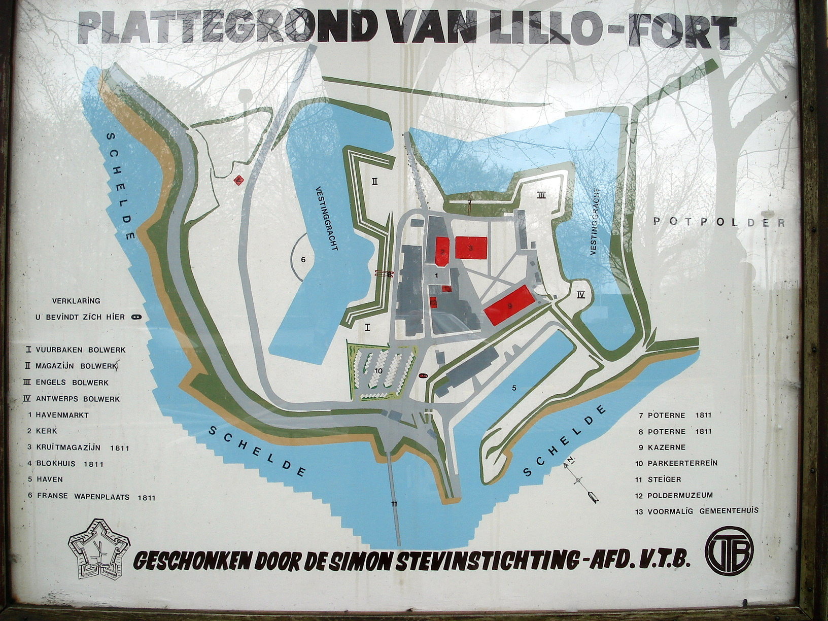 Lillo-Fort bij Antwerpen. Plattegrond die uithangt aan de ingang van het dorp.